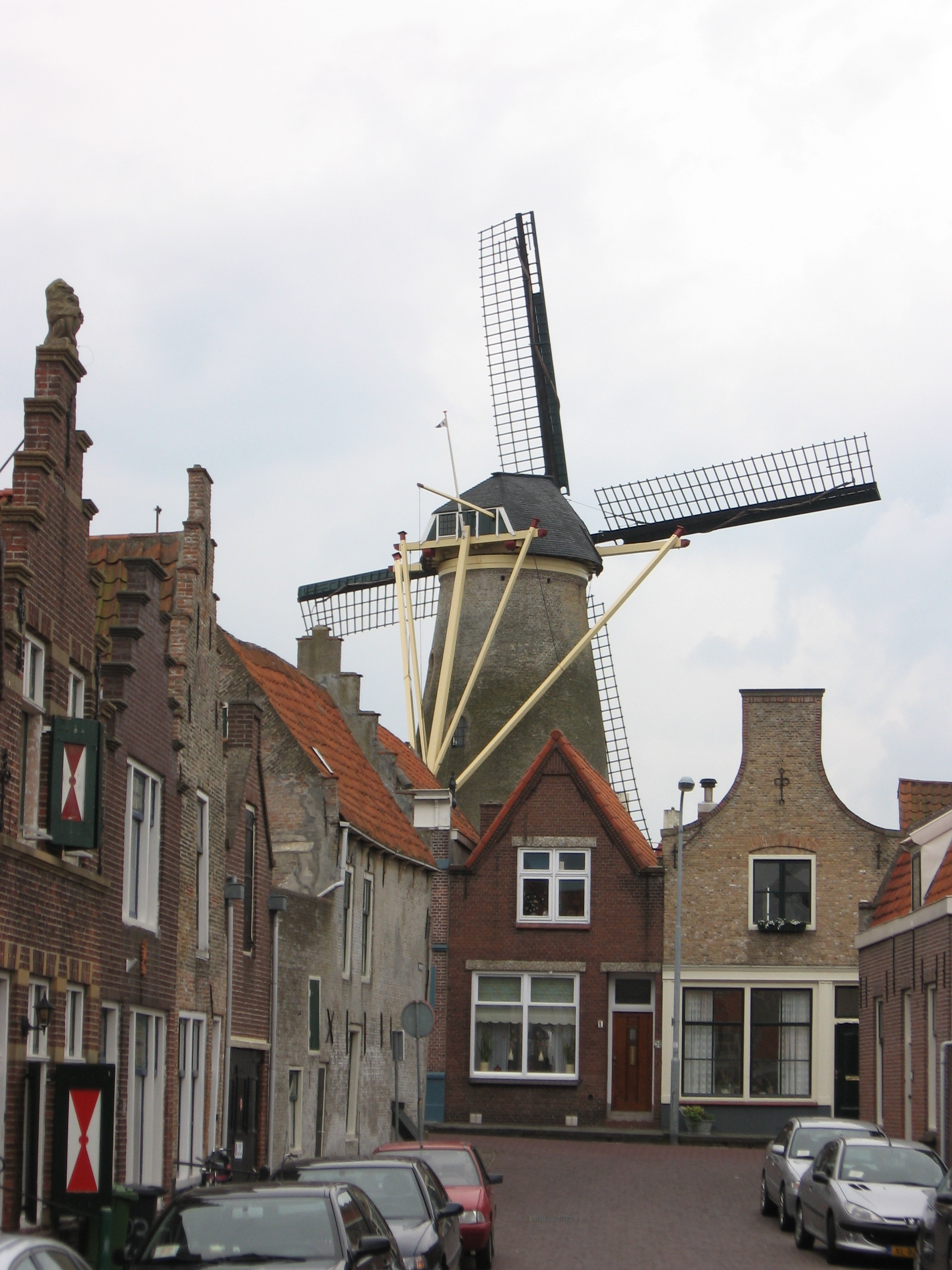 De Hoop, Zierikzee